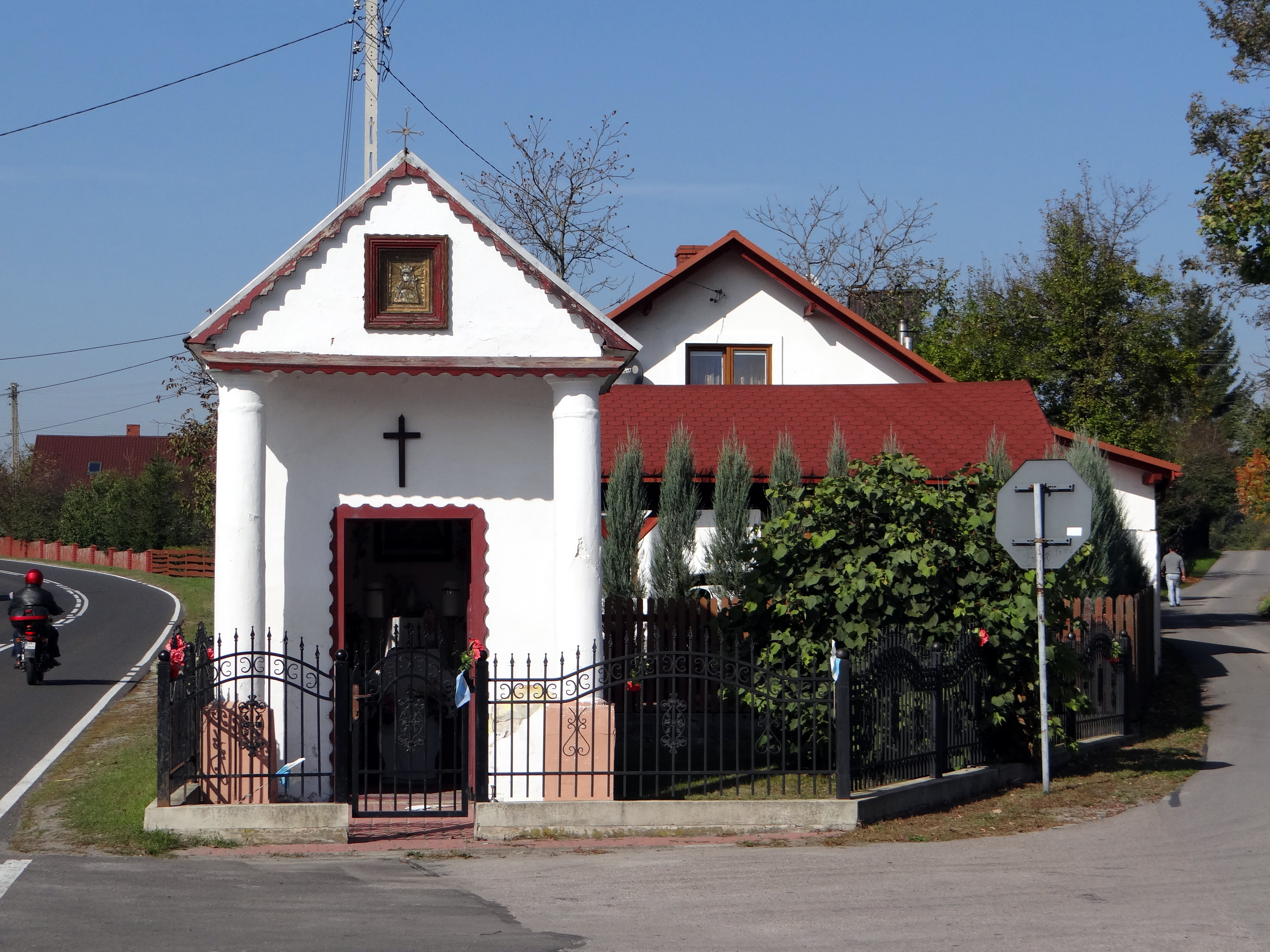 Wólka Tanewska - kapliczka przy drodze 858